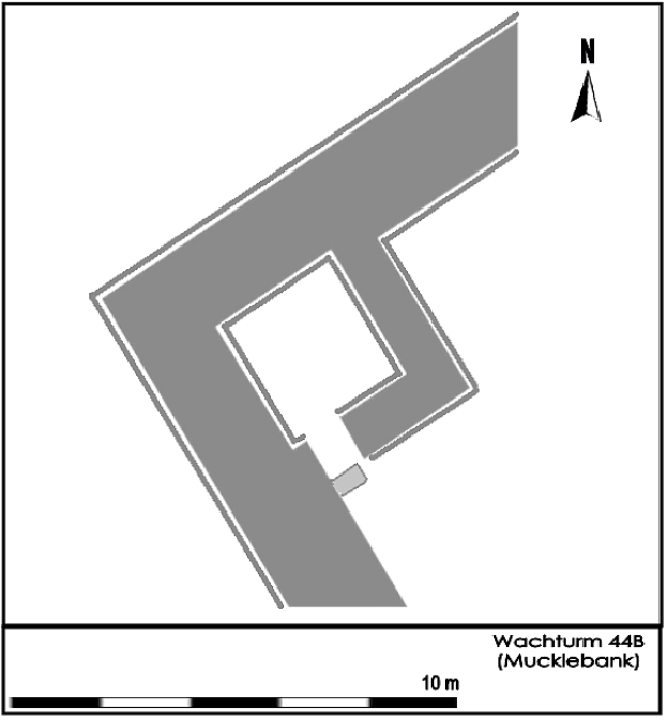 Befundskizze Wachturm 44B (Mucklebank), 2. Jahrhundert, Hadrianswall (GB).